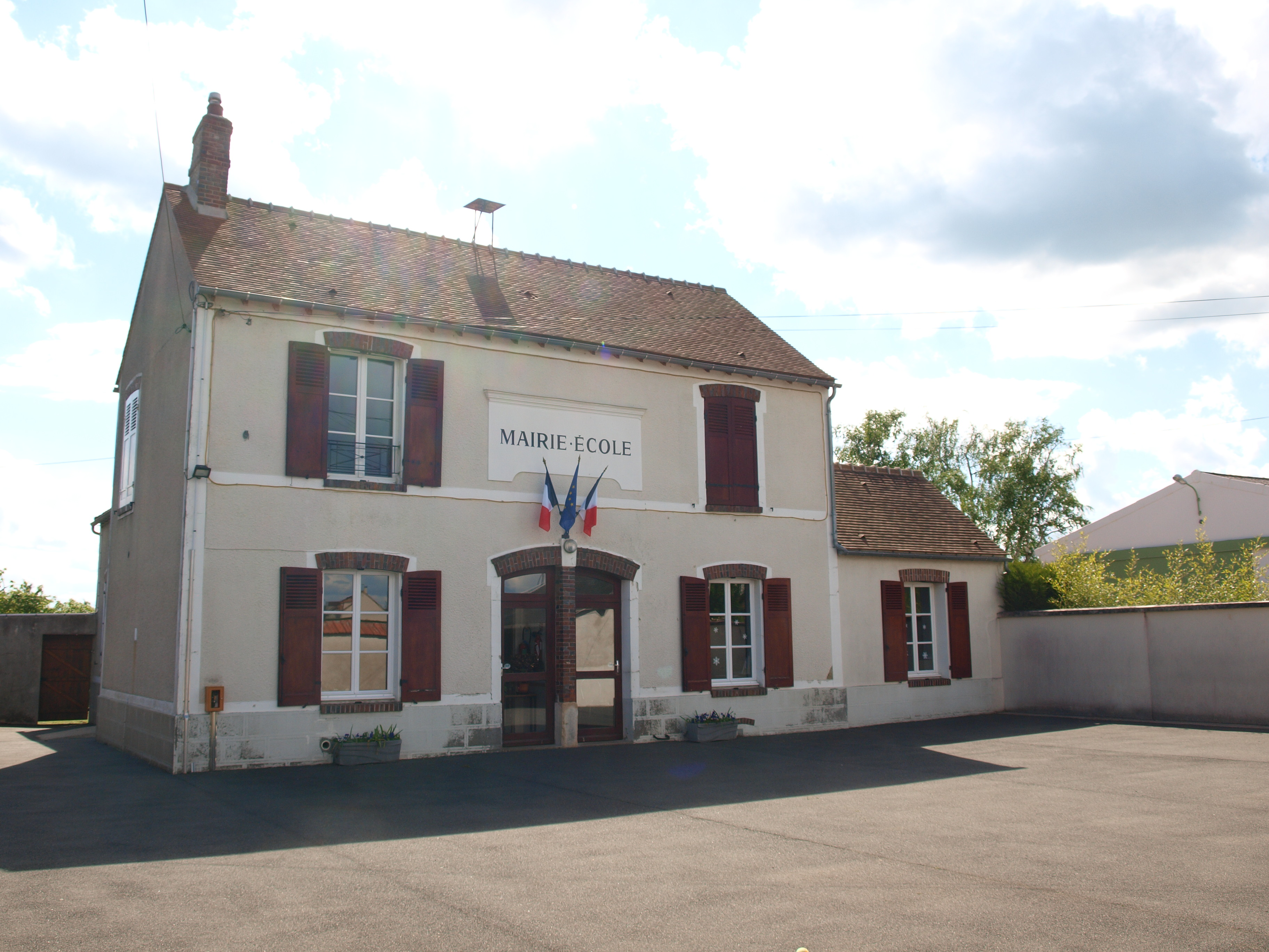 Boutervilliers , mairie